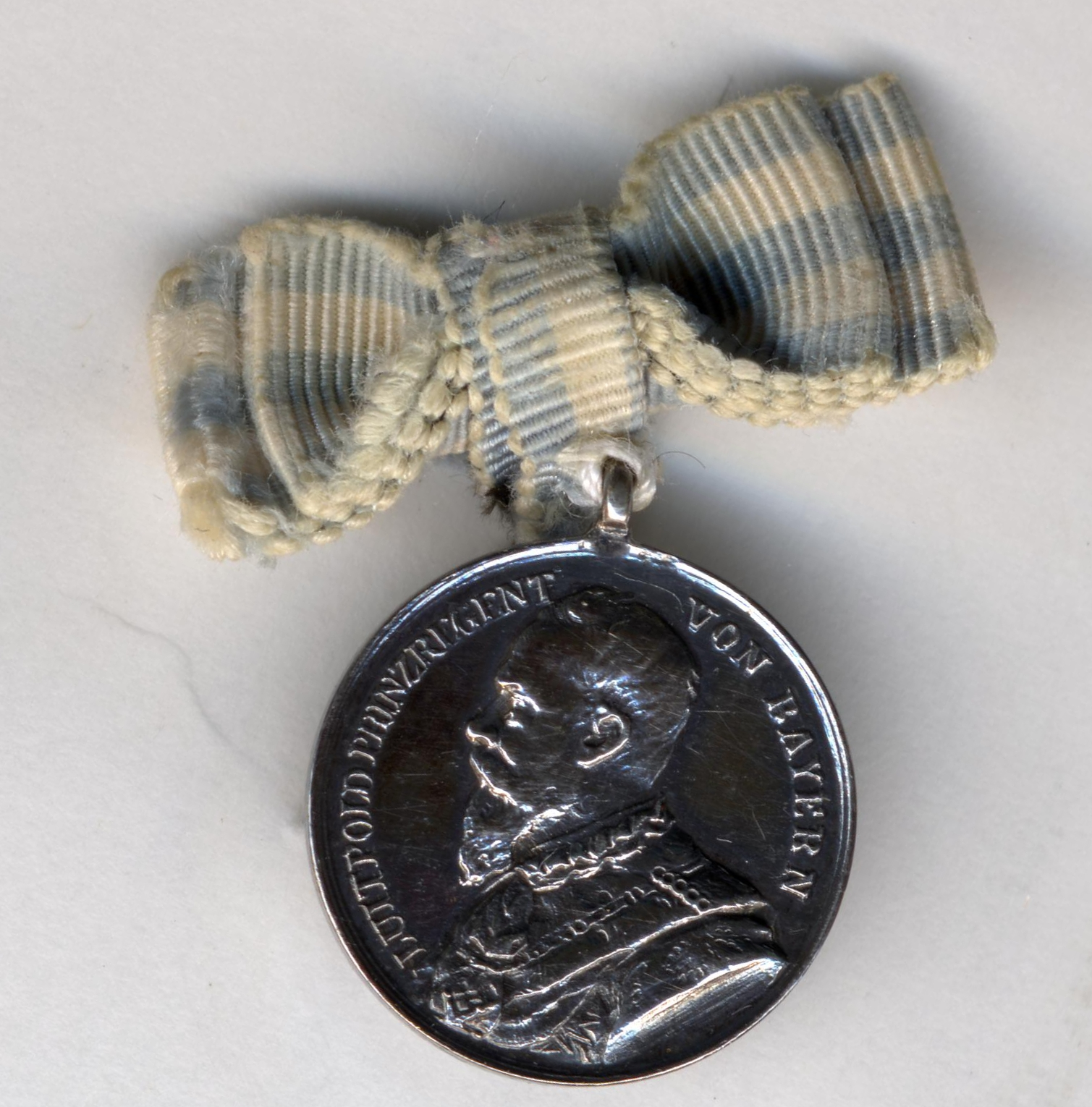 Bayerische Rettungsmedaille (Exemplar aus Familienbesitz), verliehen: 1892, Durchmesser: 15 mm